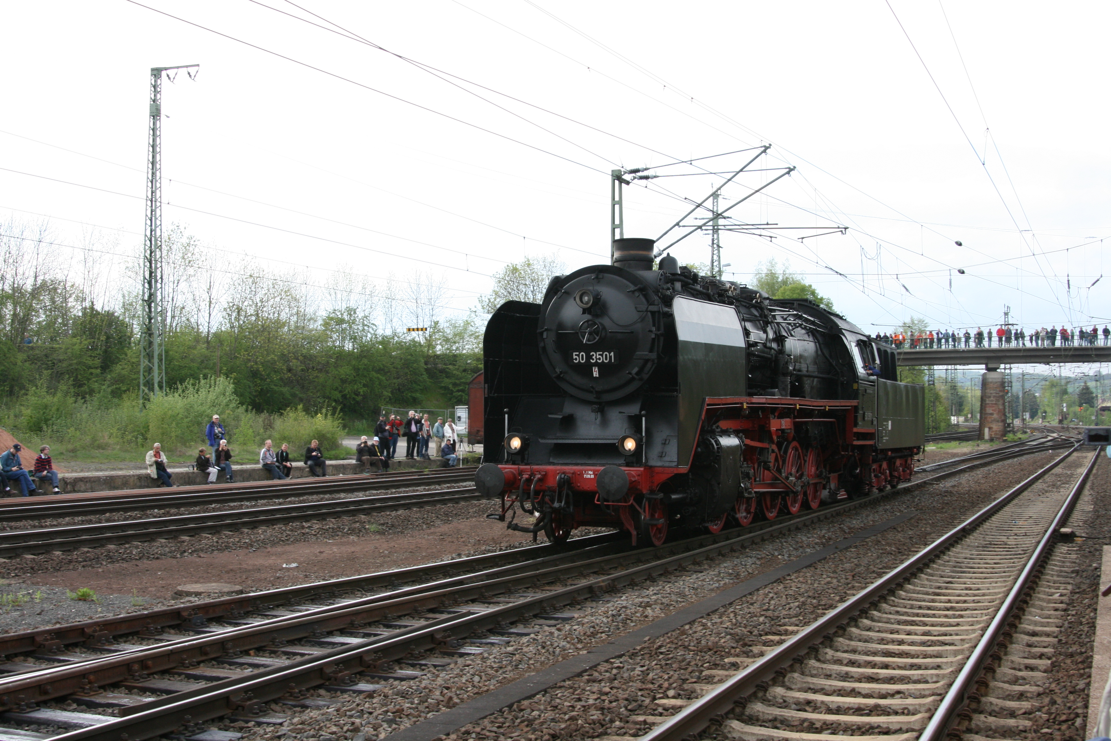 Die Dampflokomotive 50 3501 mit Wagner Windleitblechen bei der Einfahrt in den Bahnhof von Bebra.